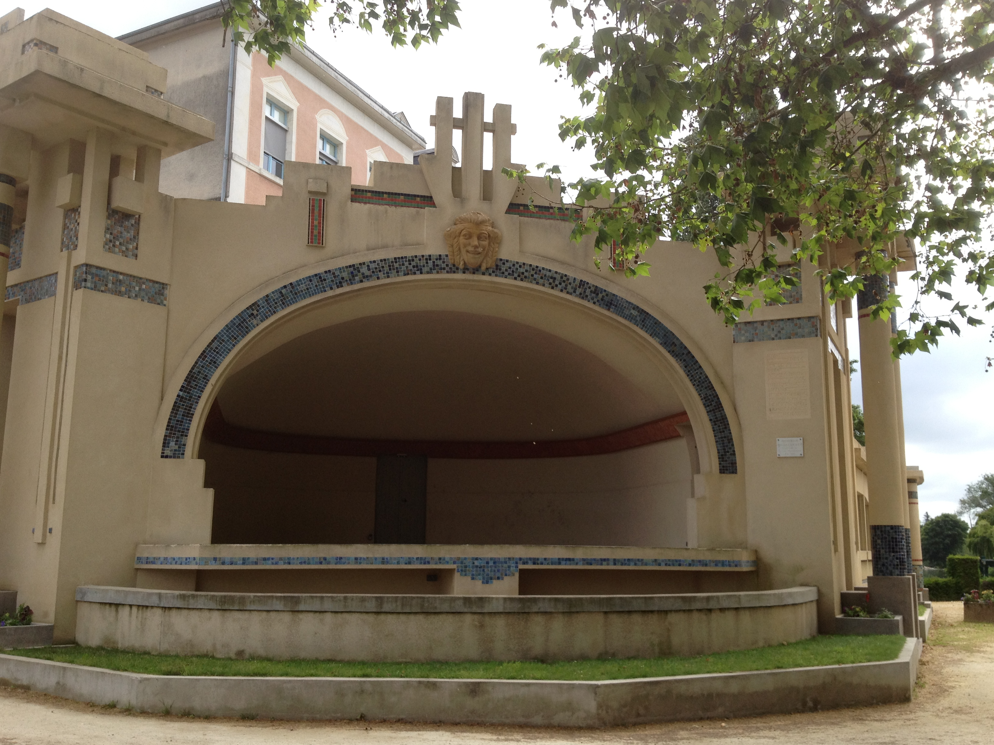 Vierzon Art déco Auditorium Jardin abbaye